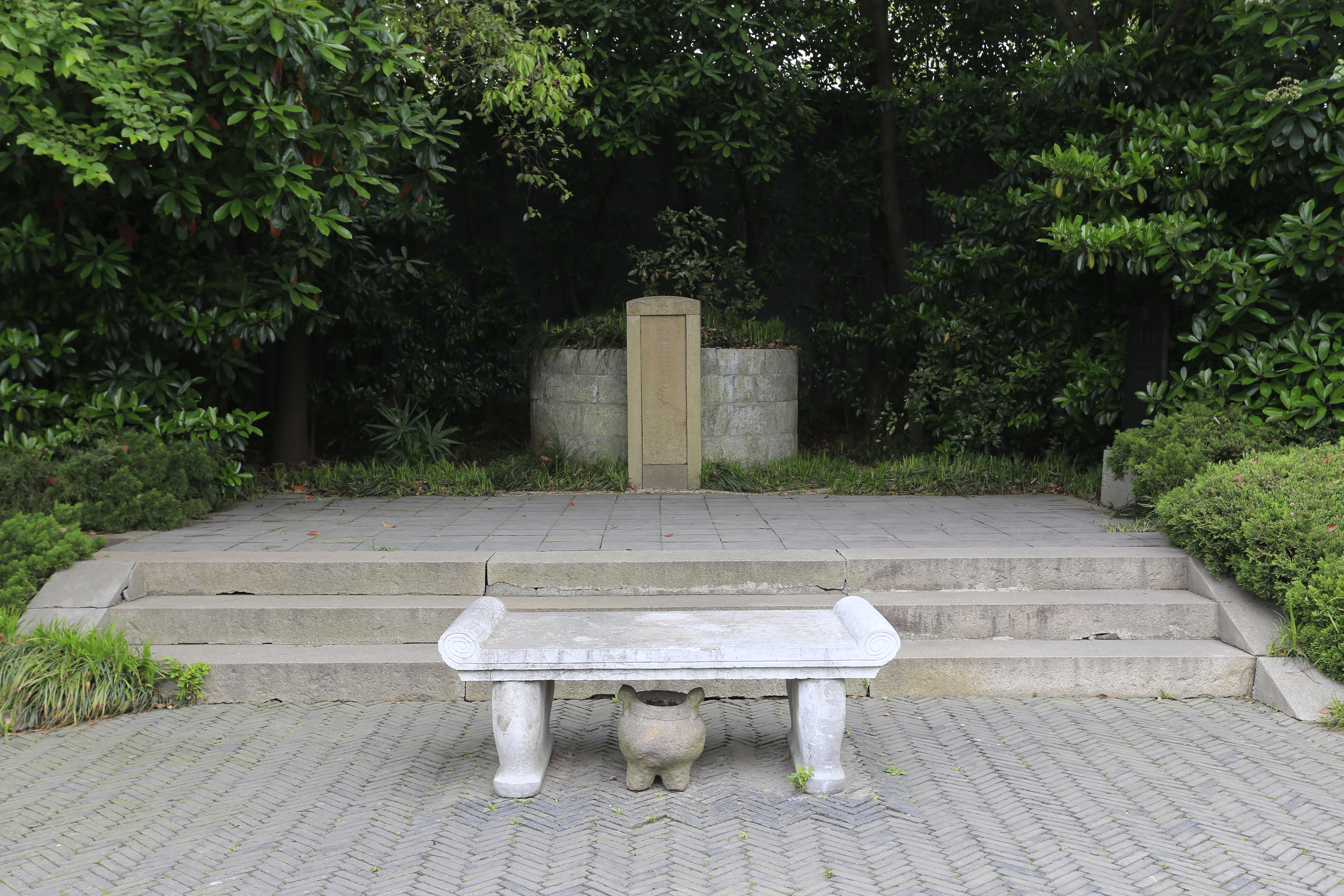 徐霞客故居及晴山堂石刻—— 徐霞客墓